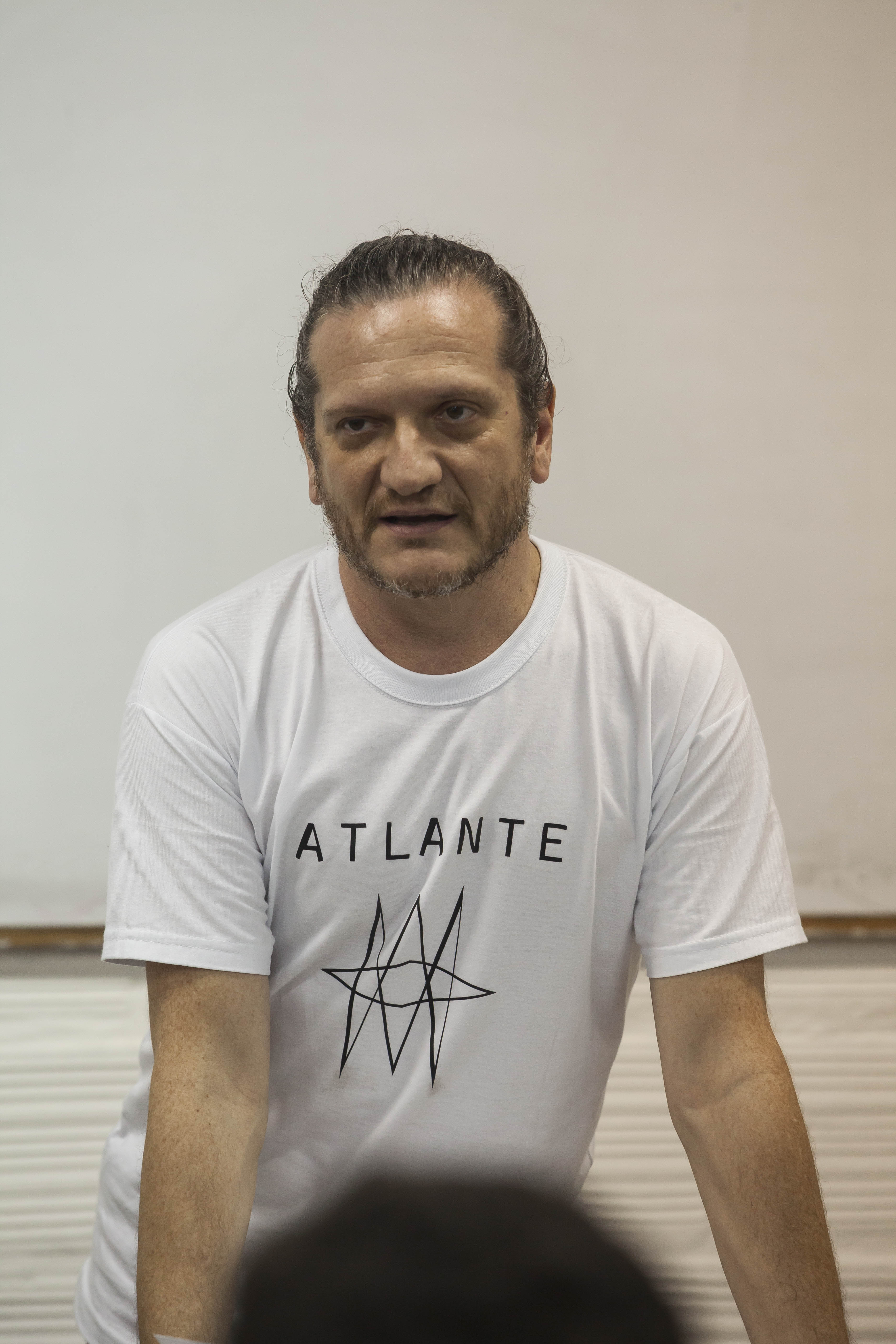 se llevó a cabo una Jornada de Filosofía Peronista organizada por el Partido Justicialista de la Ciudad de Buenos Aires, en la sede de la Facultad de Filosofía y Letras de la UBA que convocó a más de un millar de asistentes que colmaron los paneles y la mesa de Cierre. Para ello se desarrollaron en simultáneo cuatro paneles de exposición y debate bajo la consigna "Peronismo, Filosofía de Vida":"Filosofía Peronista", a cargo de Carlos Caramello, José Luis Di Lorenzo y Francisco Pestanha. "Política y Estética Peronista" en la que expusieron Daniel Santoro, Alberto Petrina y Graciela Dragoski. "La Hermandad como Ética de la Convivencia" compuesta por Darío Sztajnszrajber, Hamurabi Noufouri, Ana Zagari, y Horacio Mosquera. Y "Peronismo y Justicia Social" integrada por Dora Barrancos, Alcira Bonilla, Kelly Olmos y Julián Fava. El cierre estuvo a cargo de la Decana de la Facultad y Filosofía y Letras, Graciela Morgade, el Presidente del PJ Ciudad, Víctor Santa María y el Candidato a Jefe de Gobierno de Buenos Aires por el Frente para la Victoria, Mariano Recalde.